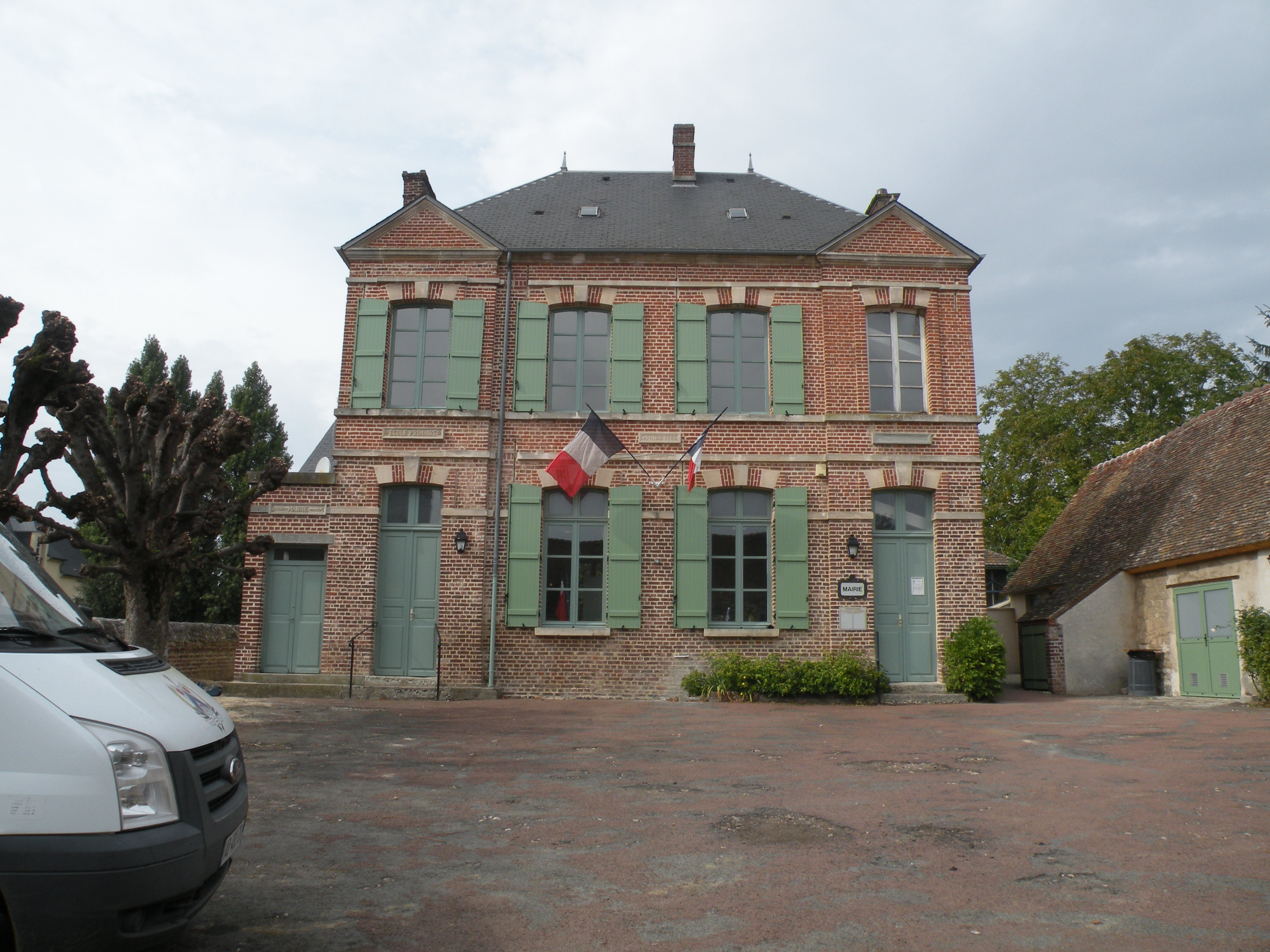 Fleury (Oise) mairie